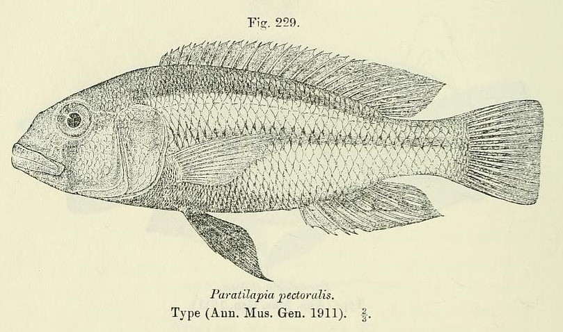 Haplochromis squamulatus